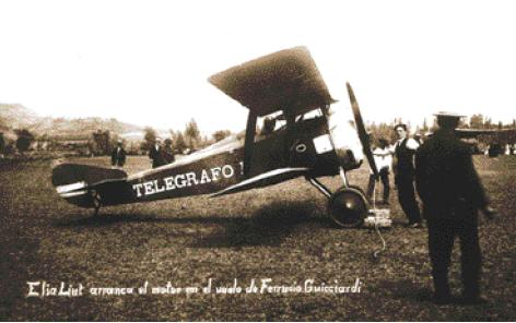 Foto de el avión el Telégrafo I